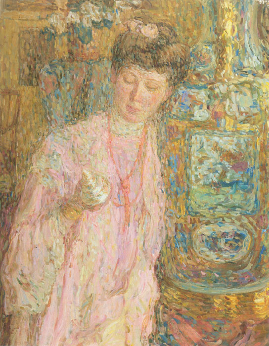 Портрет Л.Н.Гауш. 1905 г. Холст, масло 82 х 67. Портрет был представлен на многих выставках, в том числе на знаменитой выставке "Голубая роза" (1907), ставшей впоследствии названием объединения, к которому присоединился Н.Д.Милиоти. В настоящее время в собрании Третьяковской галереи.